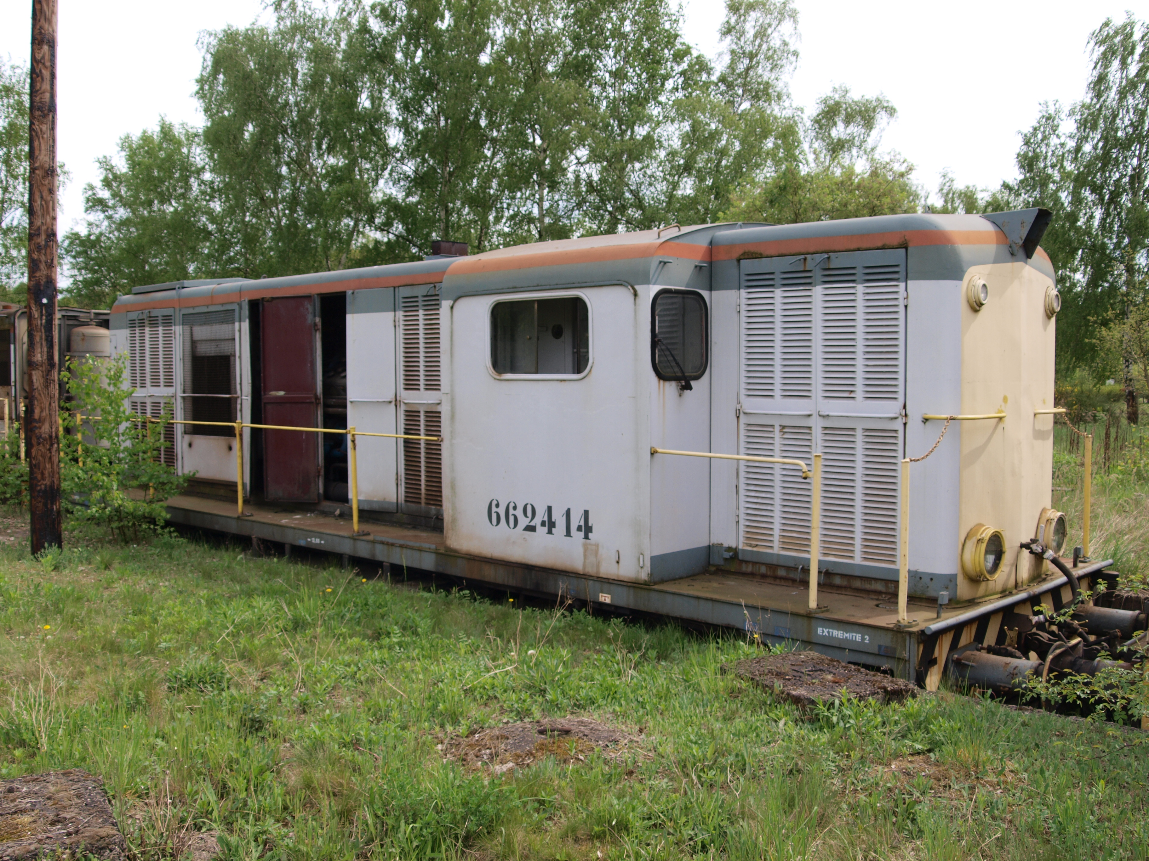 662414 diesel locomotive at Petite-Rosselle, France.